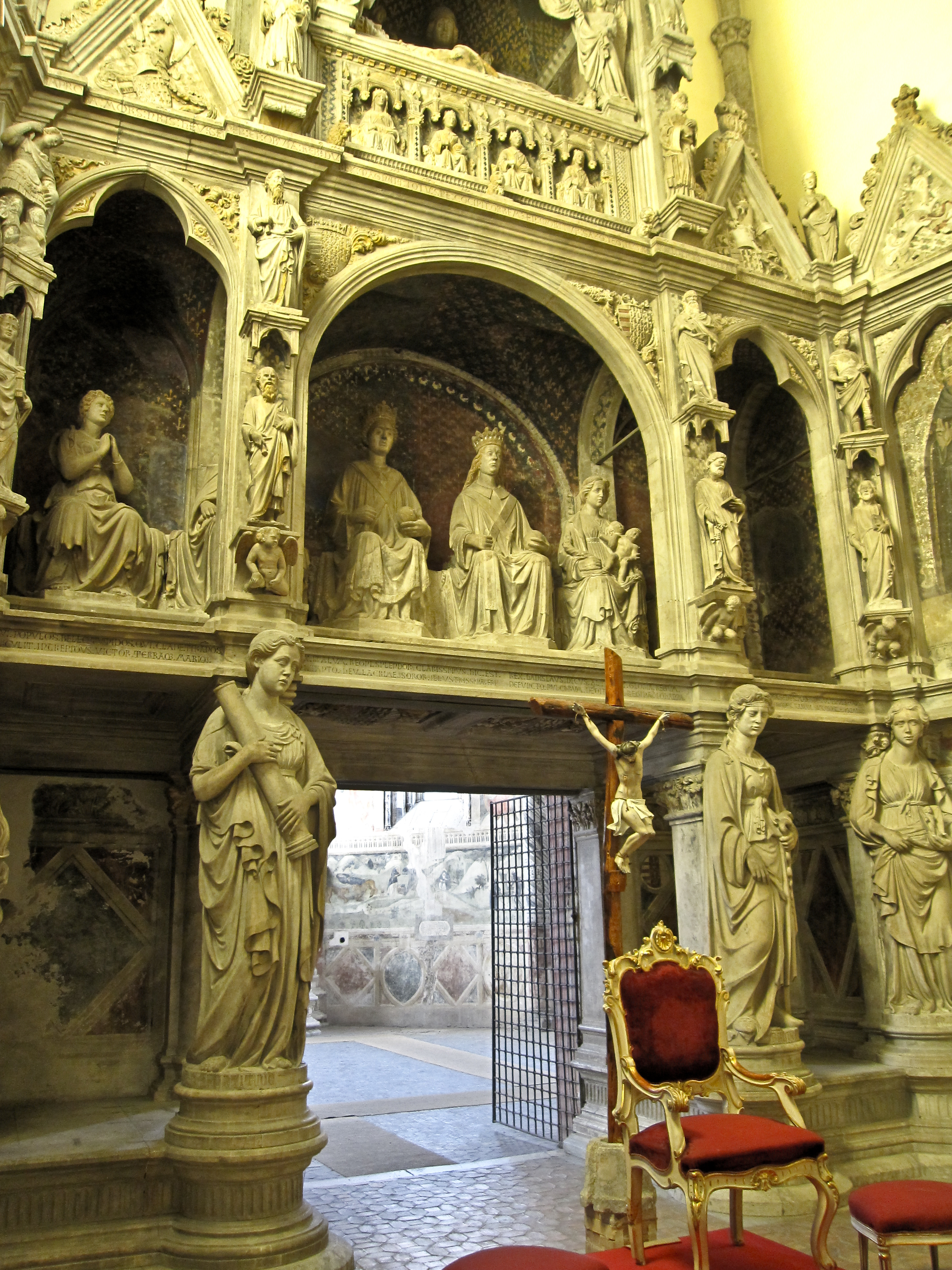 Il monumento a Re Ladislao (Particolare) Chiesa di San Giovanni a Carbonara - Napoli